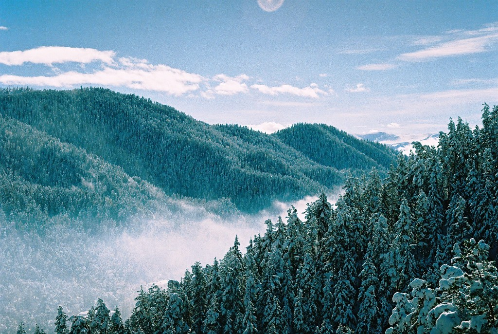 Abastumani